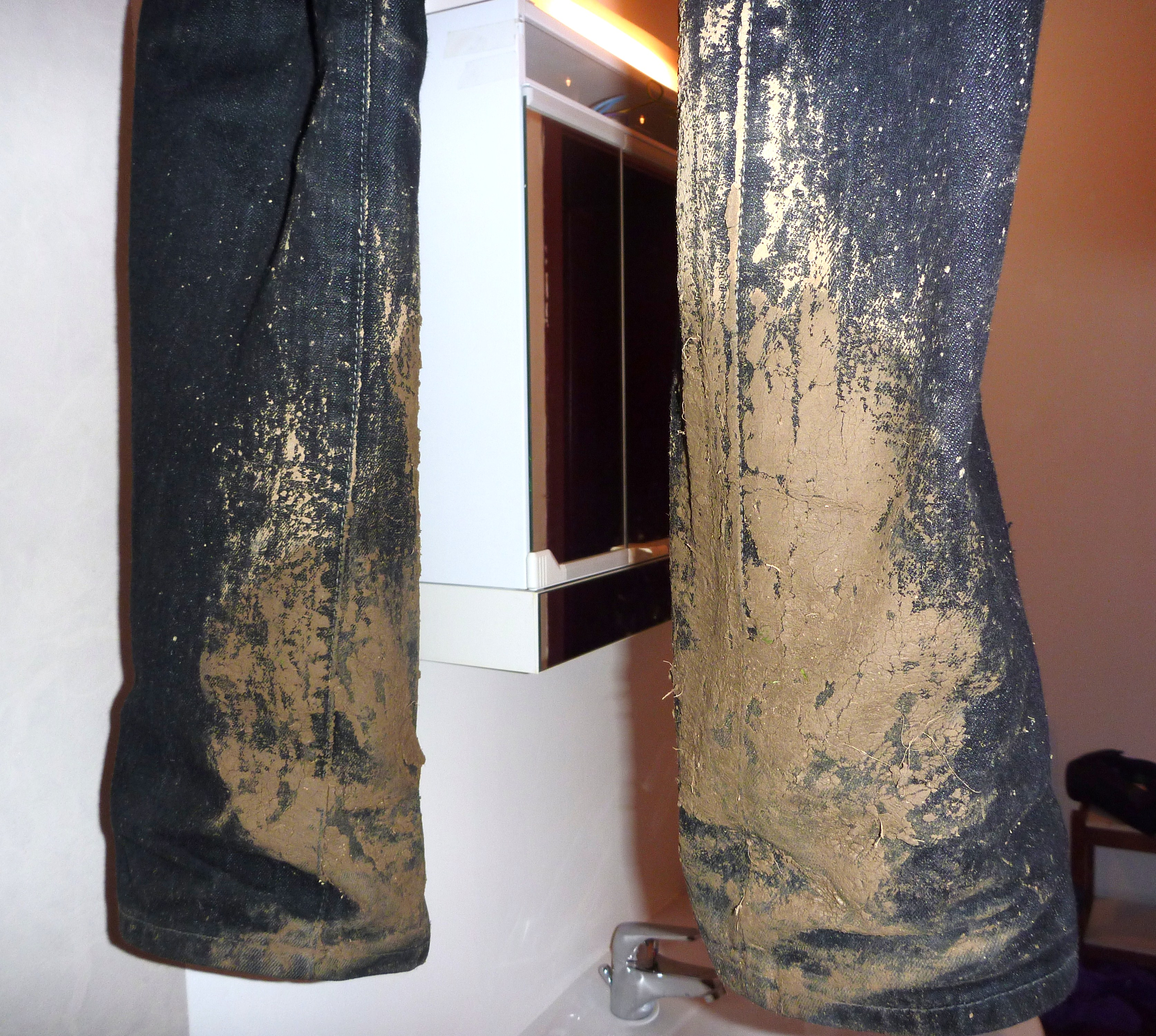 Traces de boues suite à une activité en forêt par temps humide sur sol trempé. L'usage de guêtres permet d'éviter ce genre de problème.